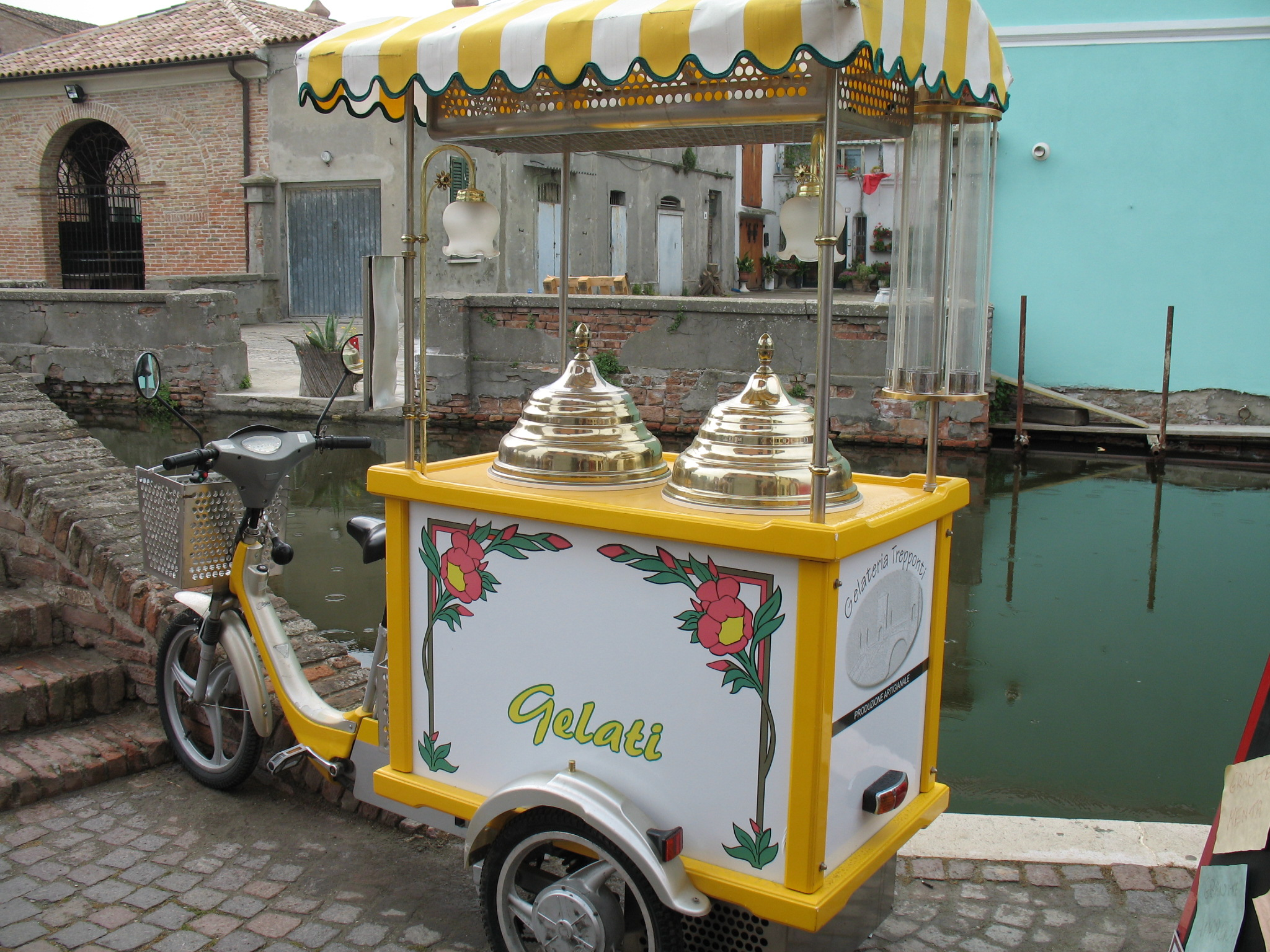 Comacchio, Emilia Romagna, Italia carretto gelati